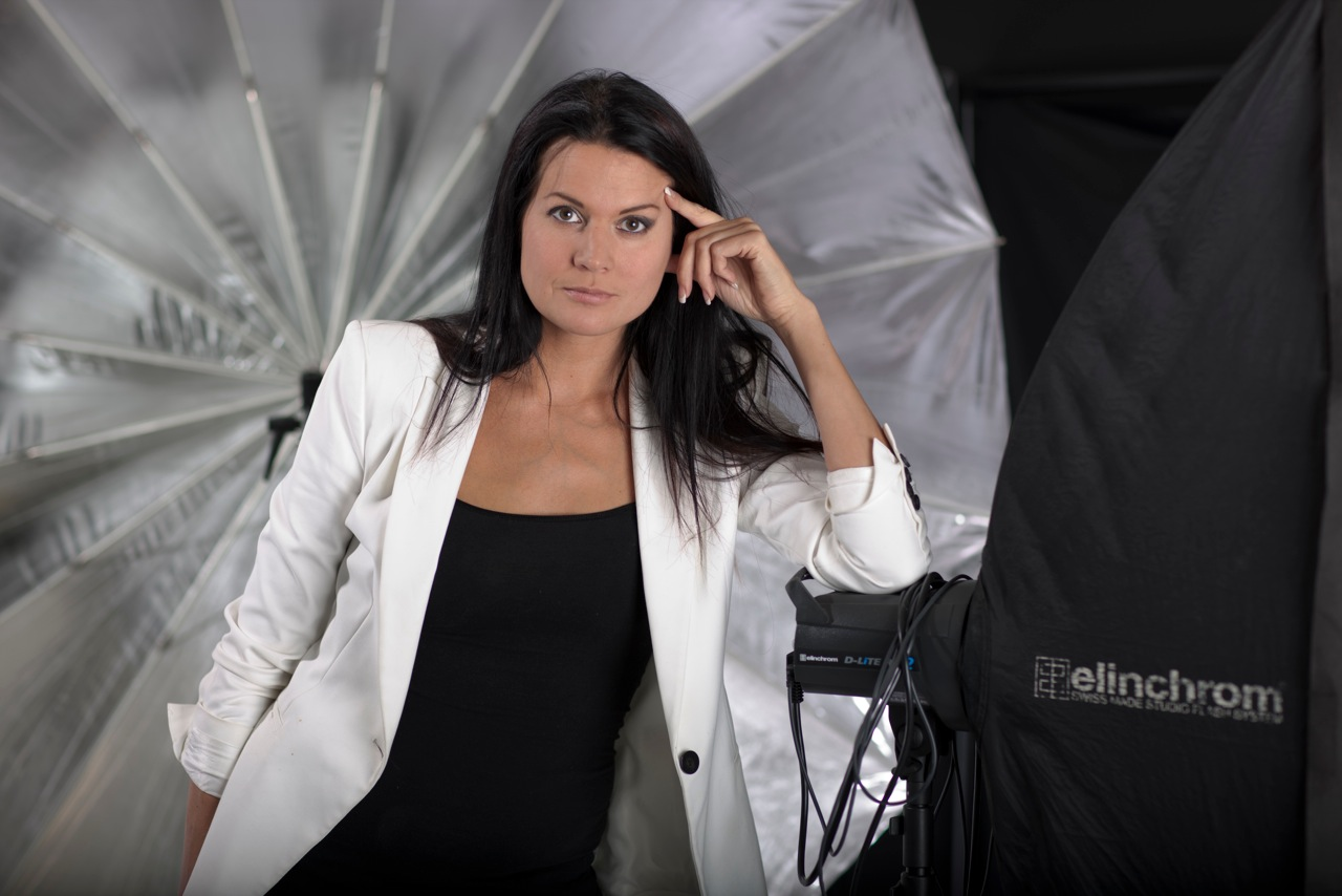 Marika Kiviharju studiolla